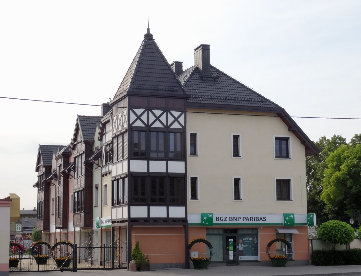 Budynek mieszkalno-usługowy w Solcu Kujawskim